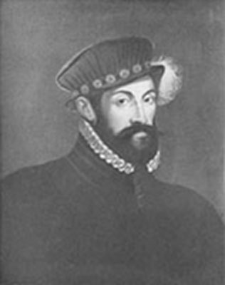 Retrato de Juan de Borja y Castro, embajador de España en Praga, en el año 1578. Quien editó en Praga su libro "Empresas Morales", del que las Bibliotecas Nacionales de Praga y Madrid atesoran varios ejemplares.